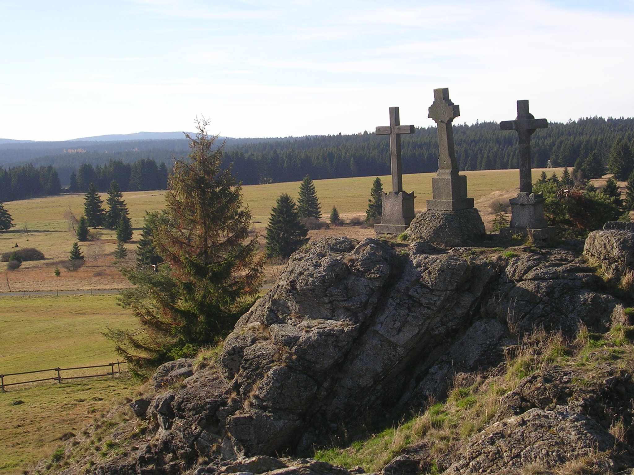 Hadcové podloží z bližší perspektivy